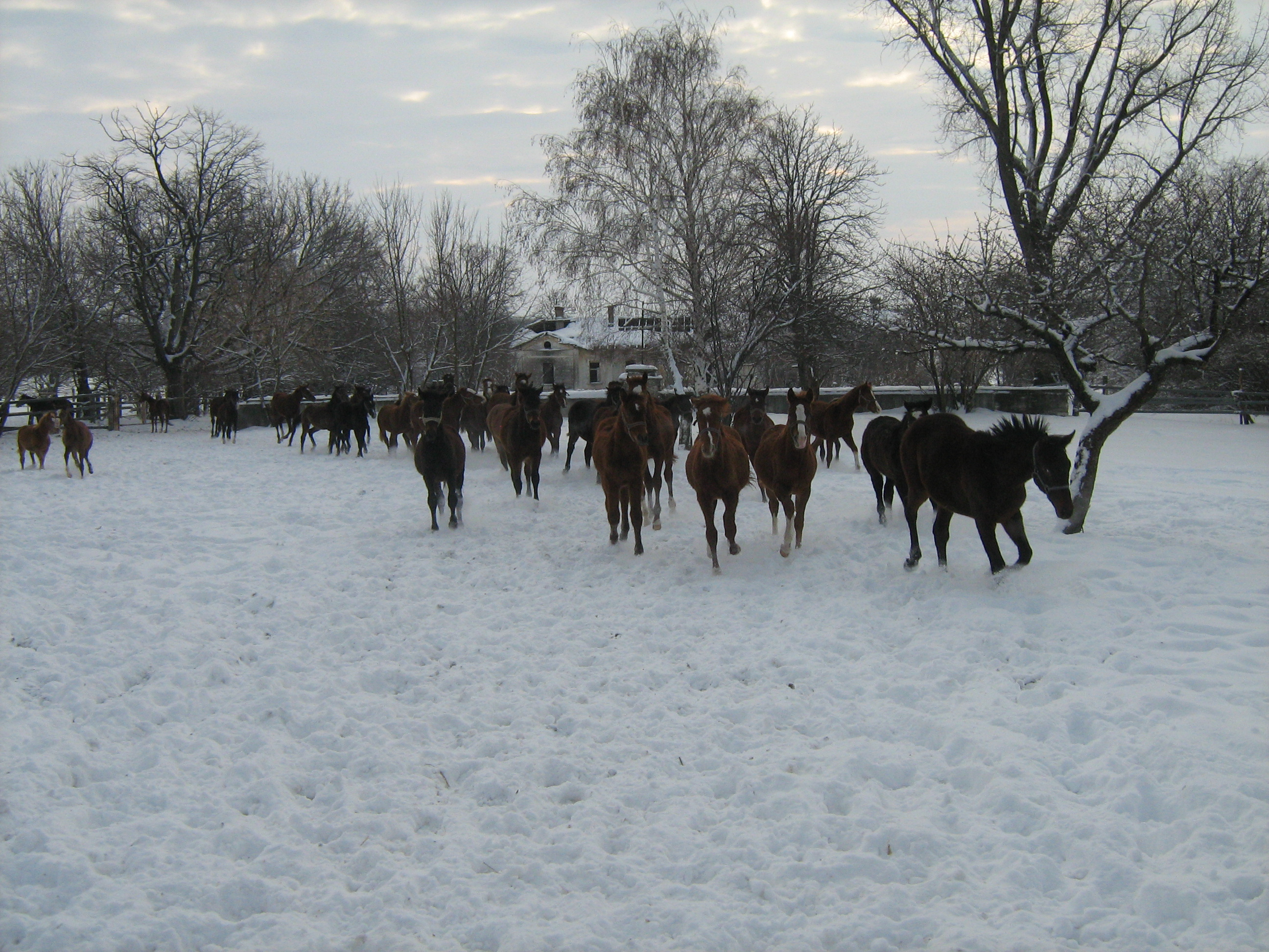 Жребчета в Кабиюк